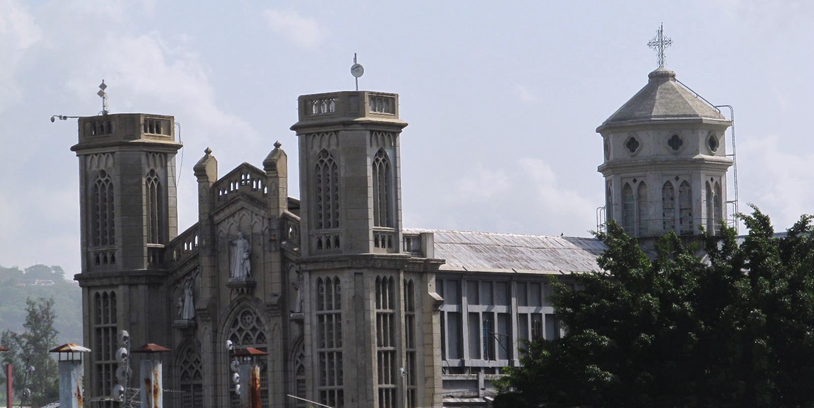 Con estilo Gótico sobre sale la Iglesia El Calvario en el Centro Histórico de San Salvador data desde los años de 1660 donde se empezó a gestionar su edificación, vista desde una de las ventanas del Palacio Nacional Fotografía editada levemente en brillos y contrastes.